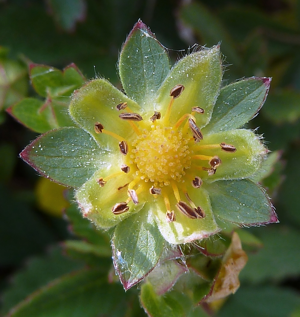 Potentilla reptans (Cincoenrama) - Flor desprovista de sus pétalos caedizos evidenciando el cáliz y el epicáliz pentámeros - La Huerta, Albatera Alicante (España).